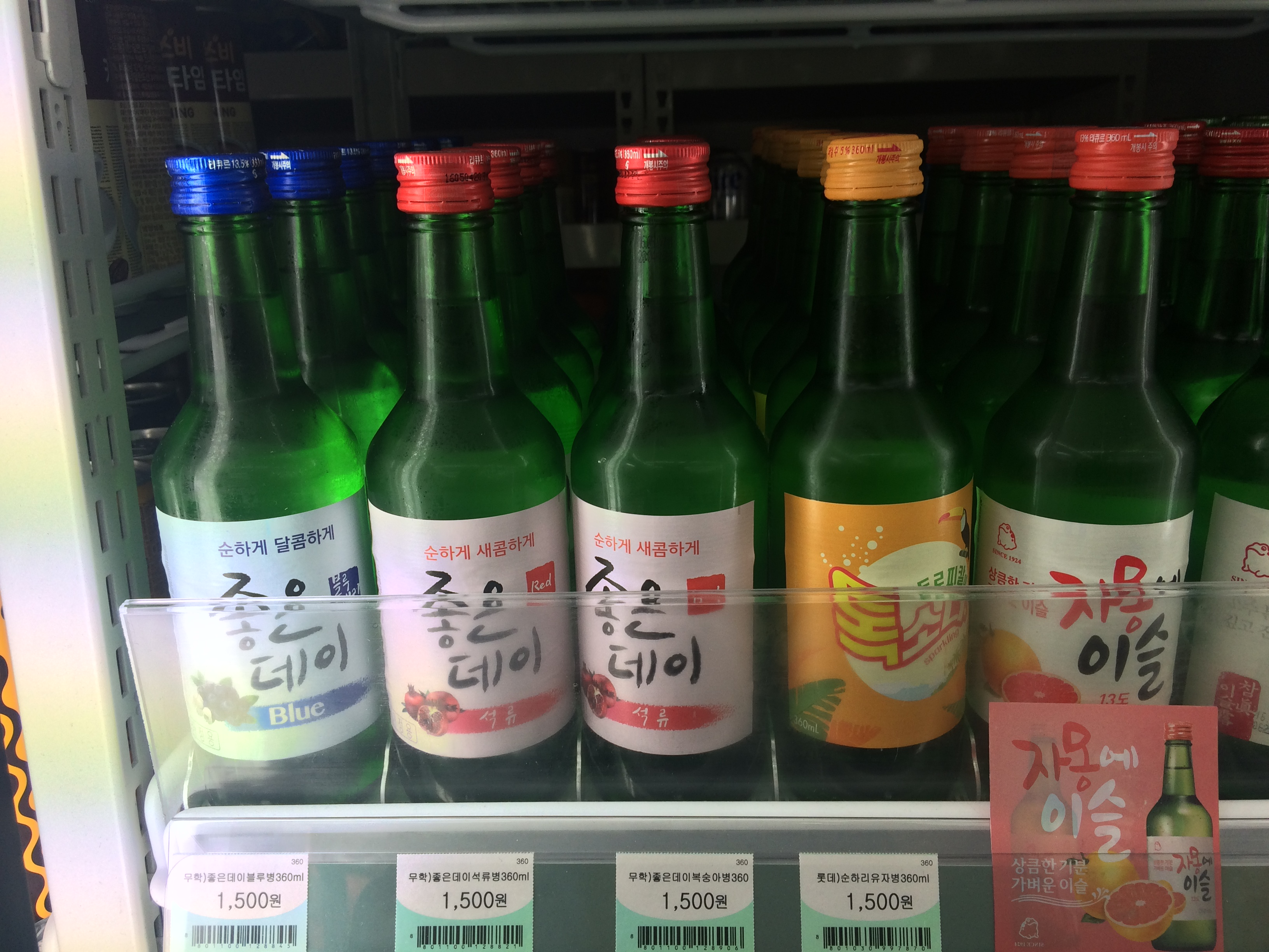 과일소주 진열